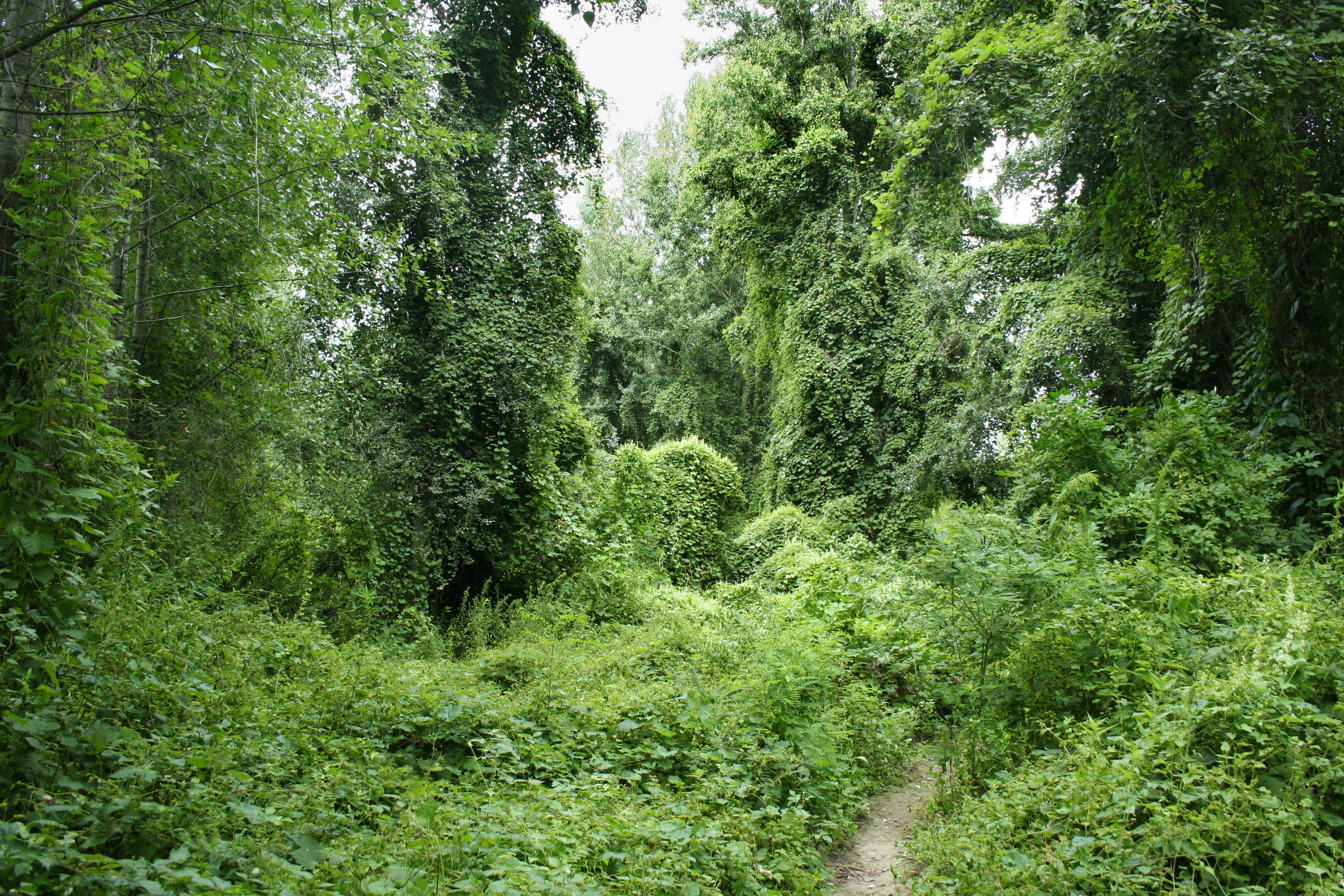 Ártéri erdő a Tisza mentén Szeged és Algyő között, a 184. folyamkilométernél